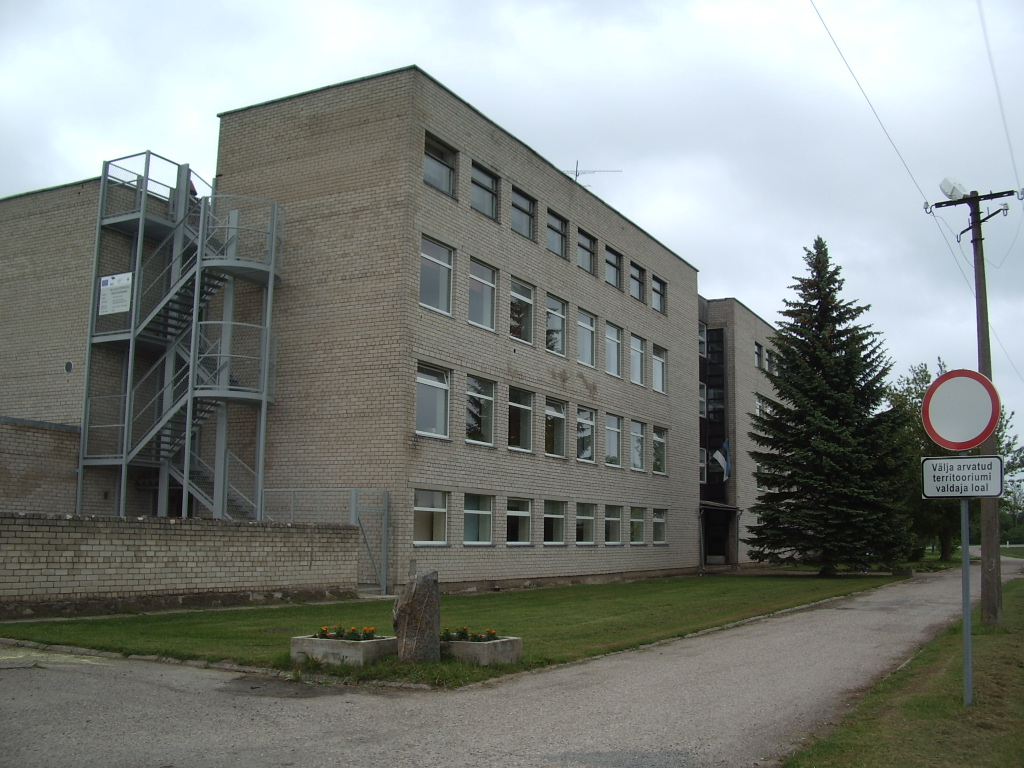 Valjala Põhikool at Valjala, Saare County, Estonia